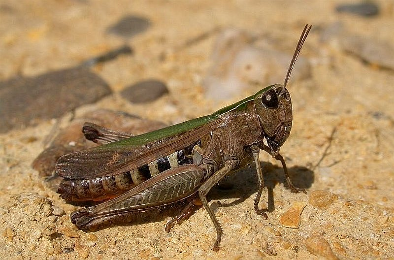 Omocestus rufipes (ex ventralis) - Lagune du Gât Mort, Gironde, France